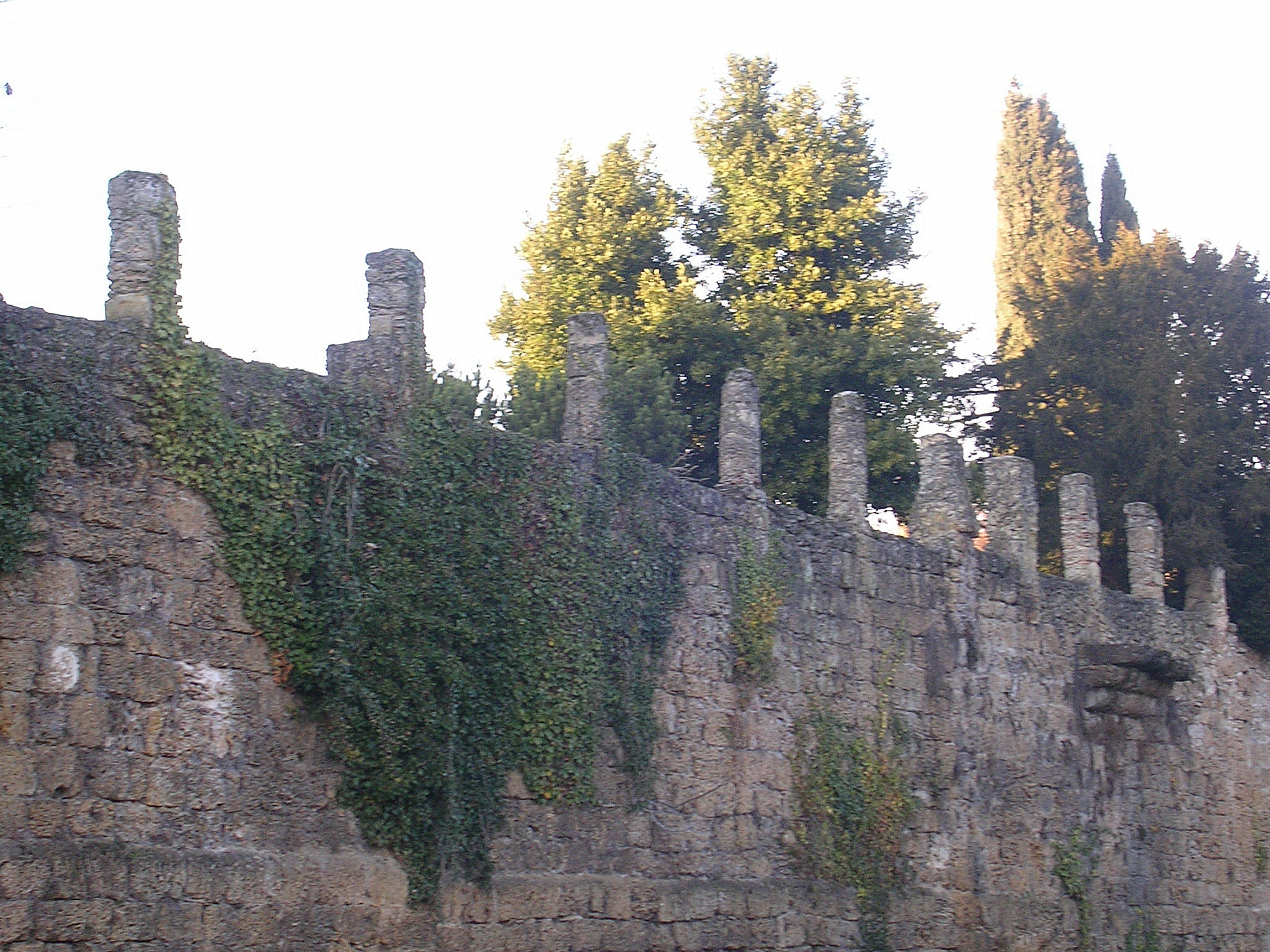 Photo des remparts de Mont-de-Marsan. Photo prise par Jibi44